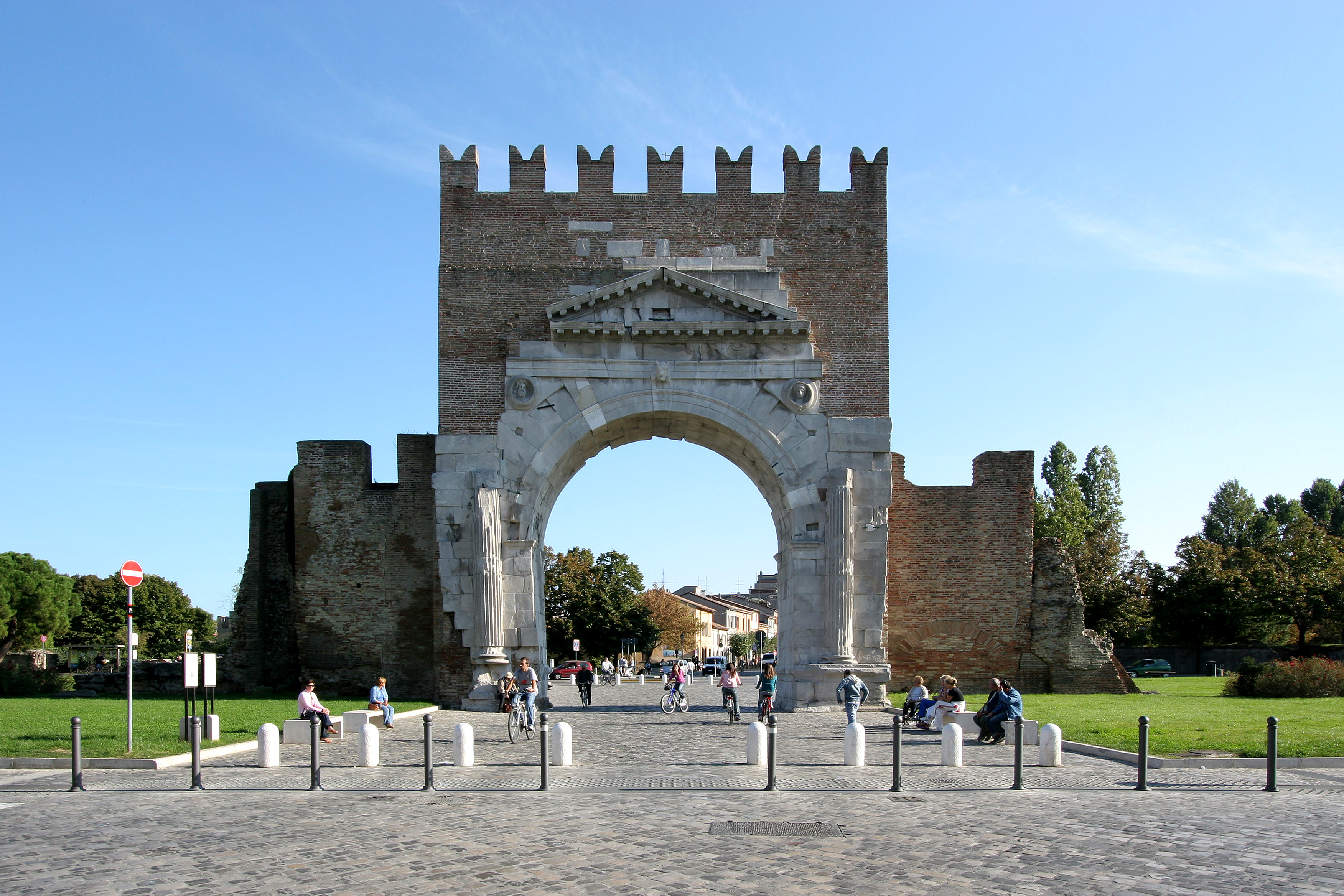 Arco di Augusto This is a photo of a monument which is part of cultural heritage of Italy.